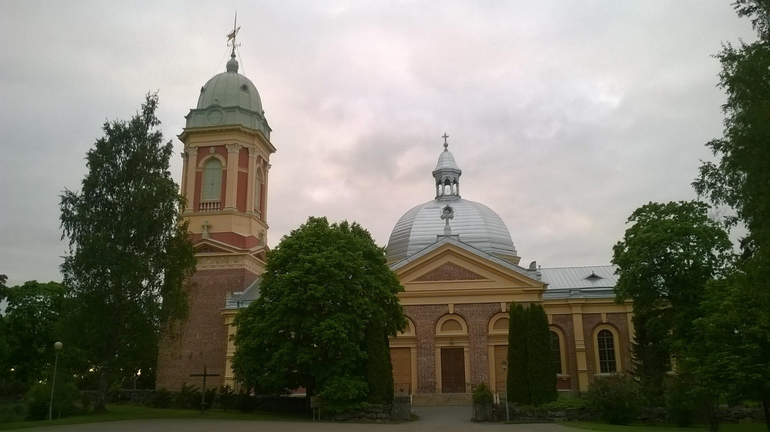 Kanta-Loimaan kirkko; kirkkorakennus Loimaalla, Suomessa.